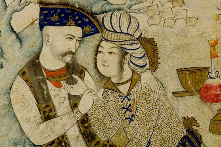 Шах Аббас обнимающий пажа. деталь.1627